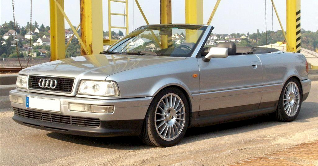 Mein eigenes Cab, BJ 98, vor dem großen Facelift. selbst fotografiert --Ollfried 09:05, 20. Feb. 2007 (CET)